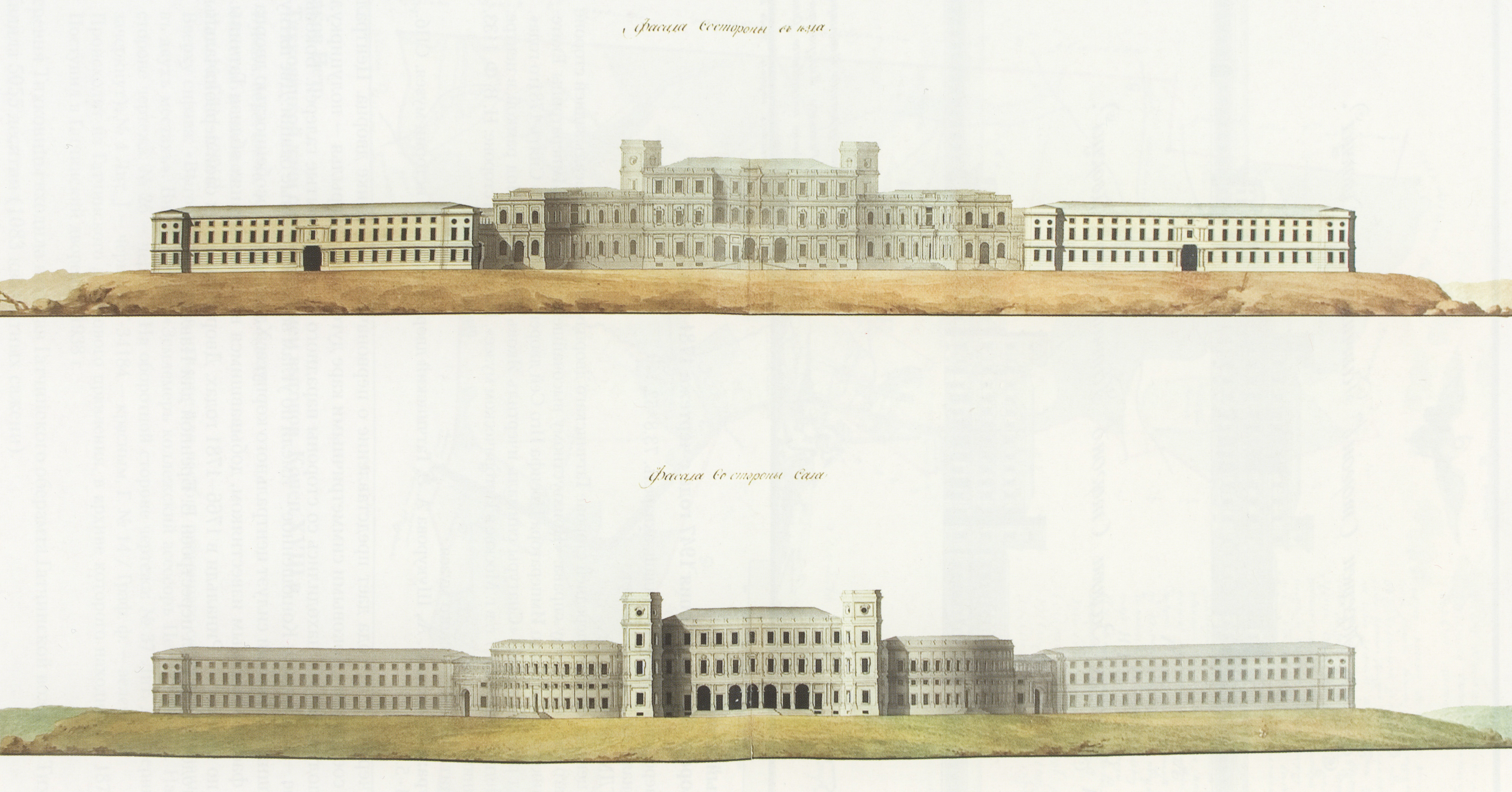 Большой Гатчинский дворец. Фасады.